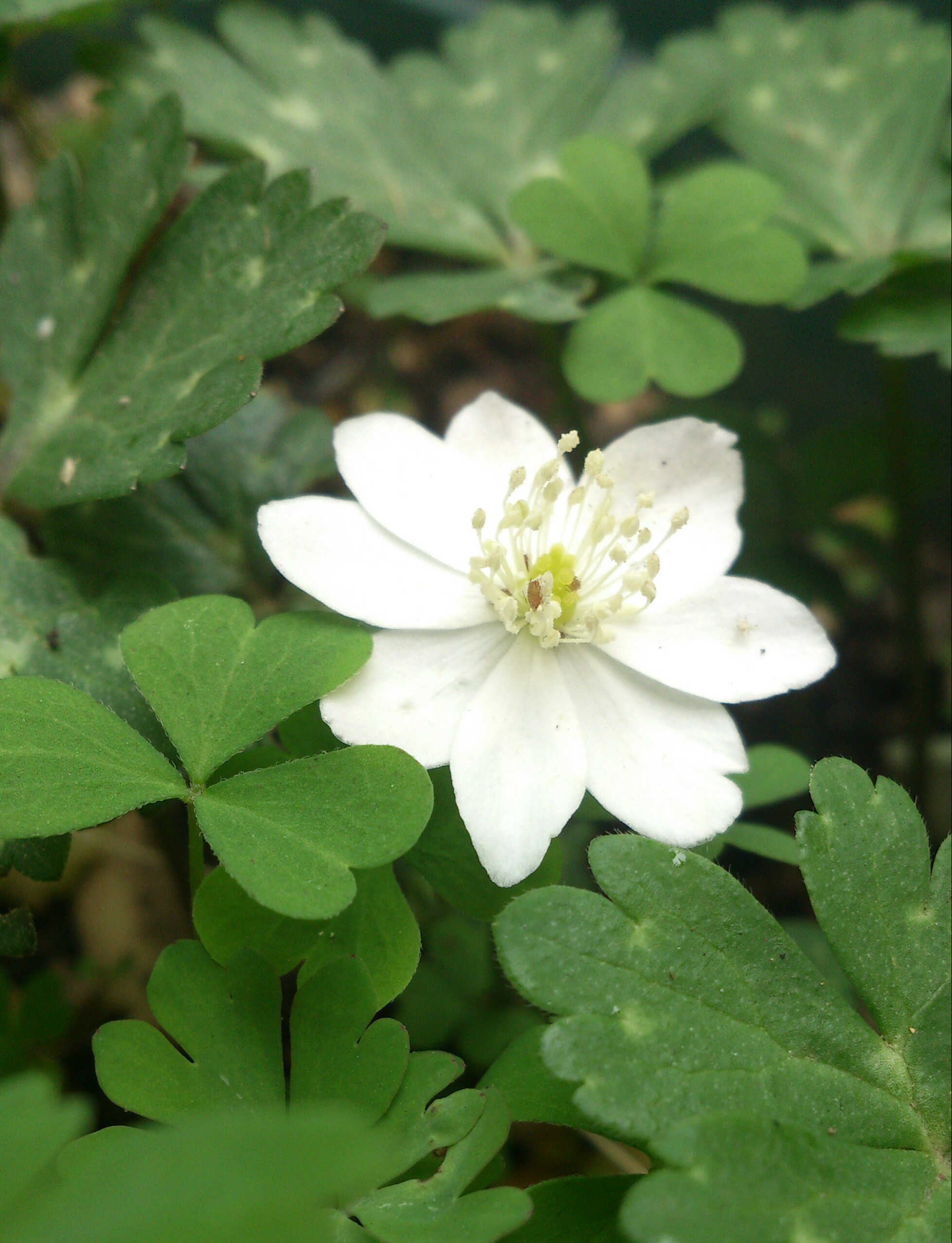 横浜市旭区のニリンソウ